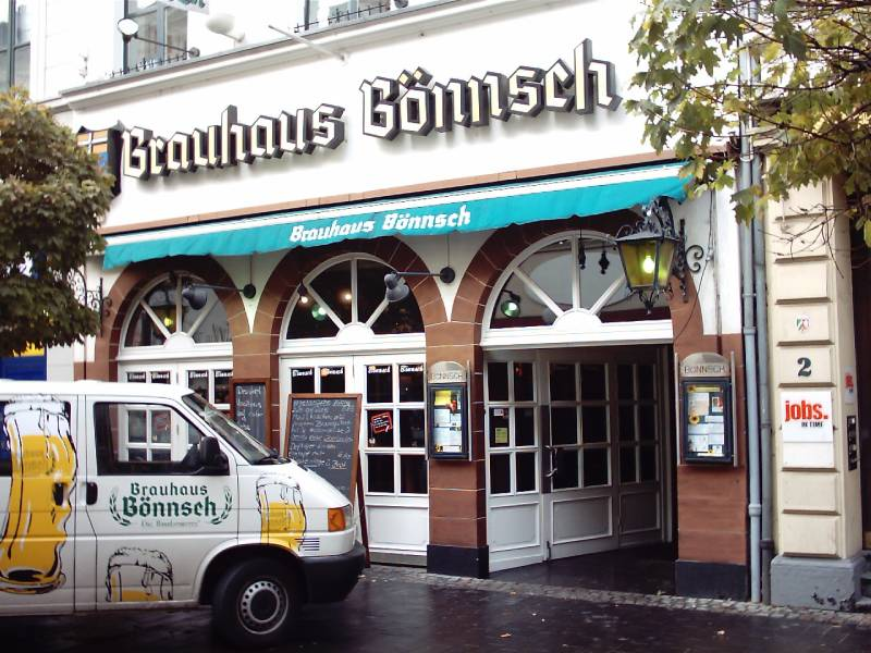 Brauhaus Bönnsch in Bonn